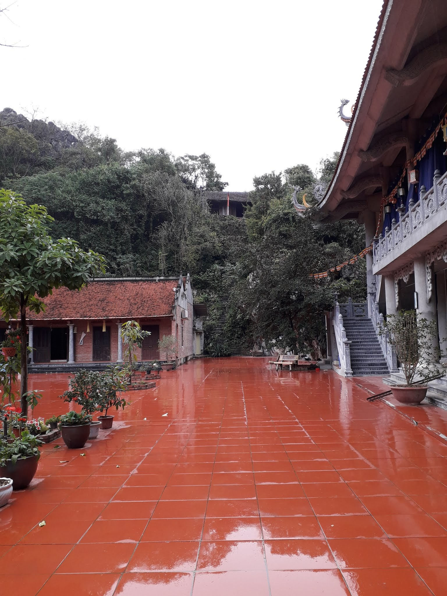 Đền Tử Đồng Đế Quân nhìn từ dưới cổng chùa lên.